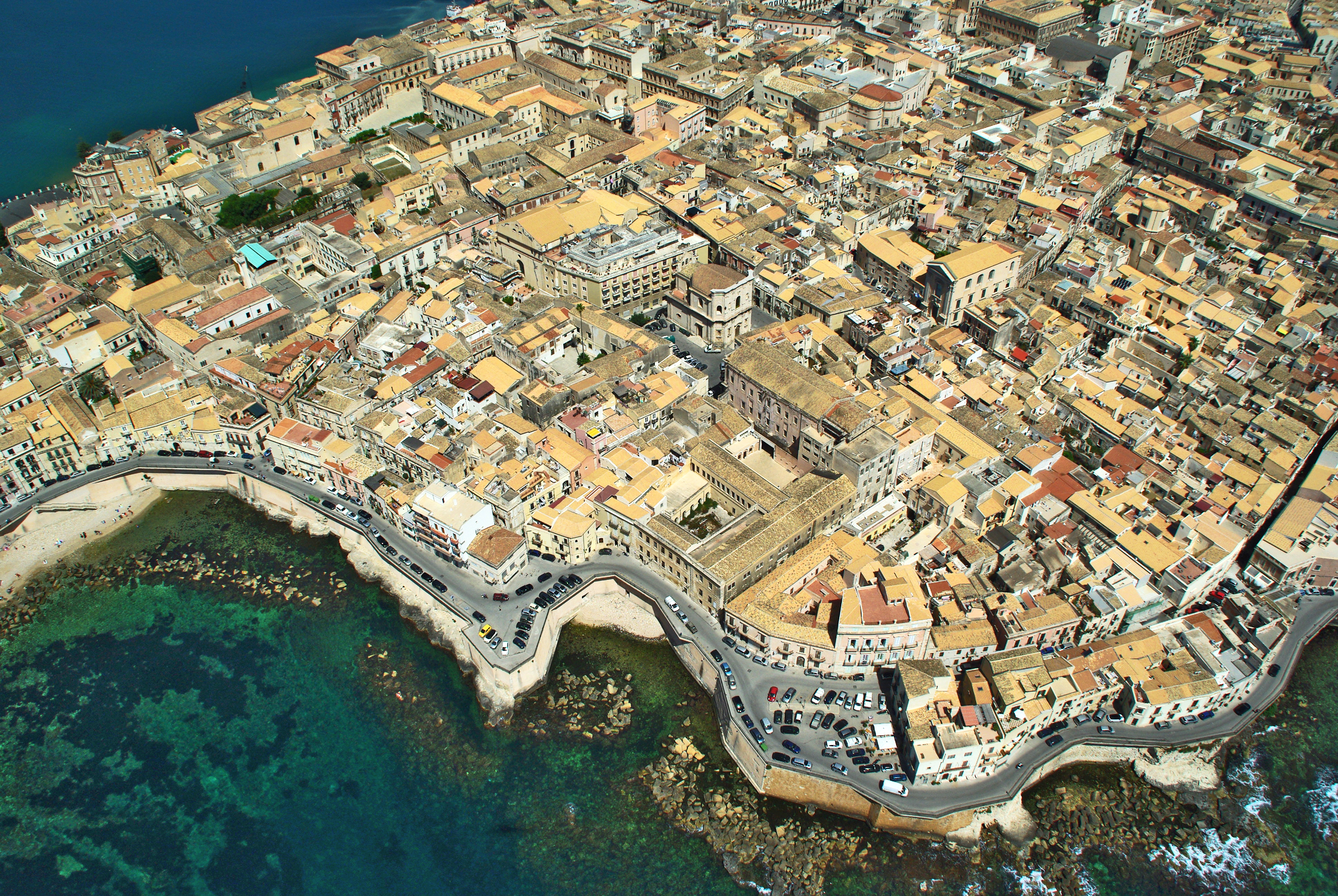 Veduta aerea di Ortigia, Siracusa